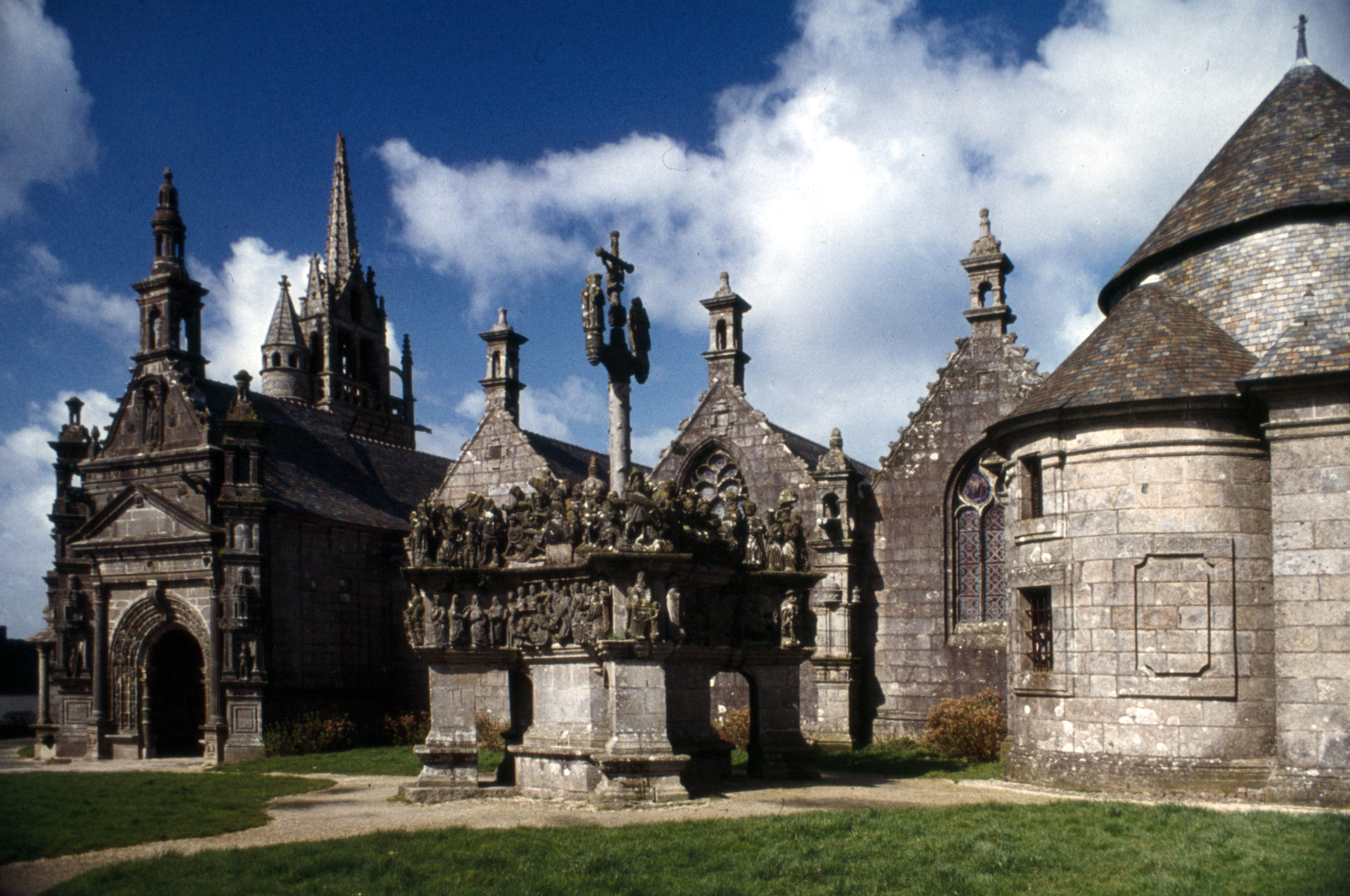 Guimiliau